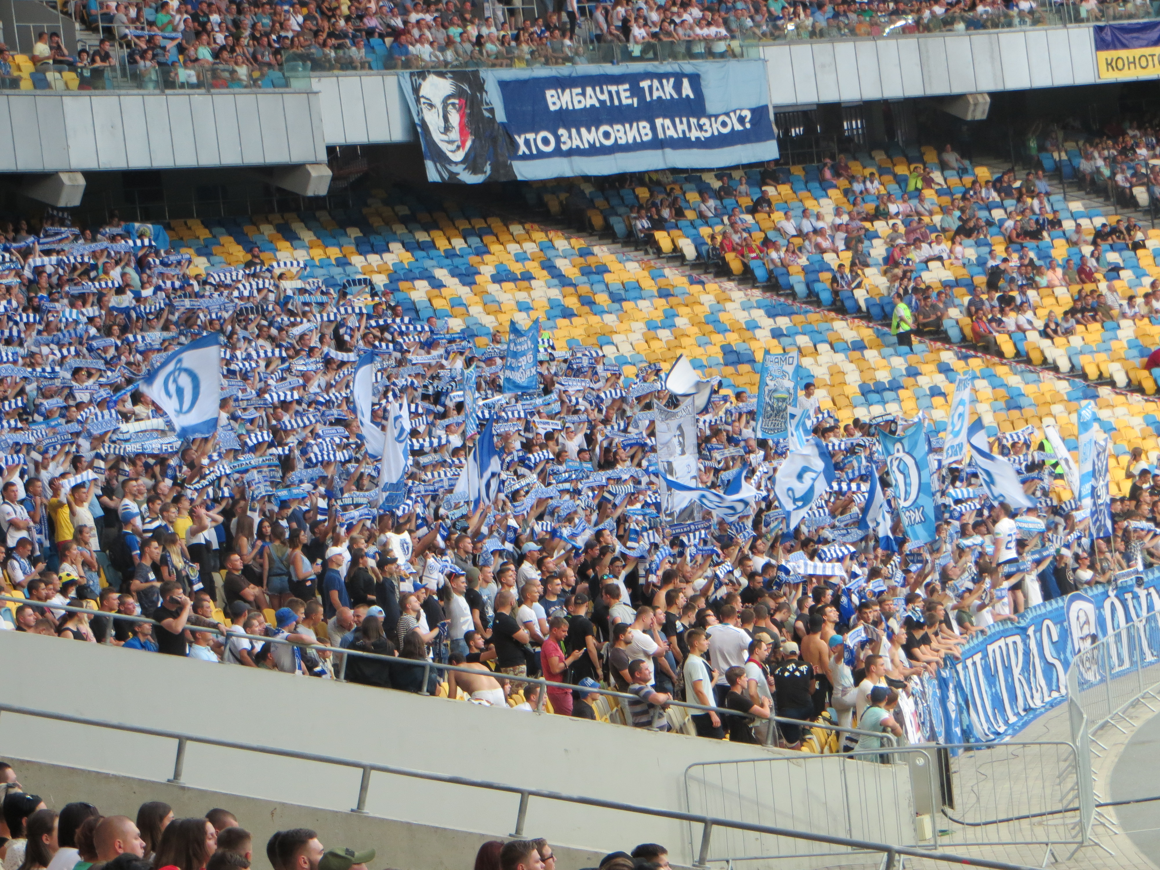 14.08.2018 Ліга чемпіонів УЄФА 2018-2019. Динамо (Київ) - Славія (Прага) 2:0